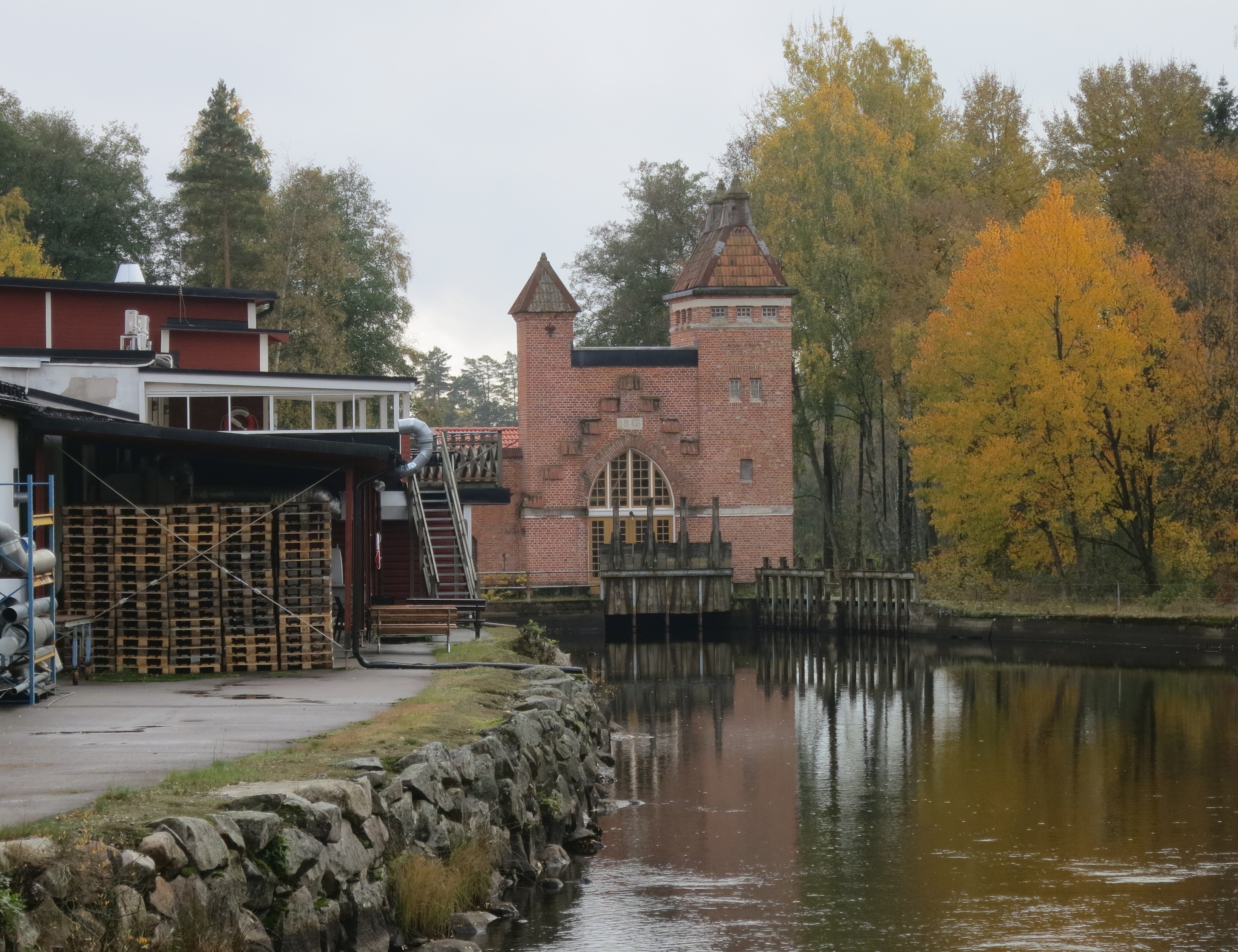 Dångs kraftverk i Konga